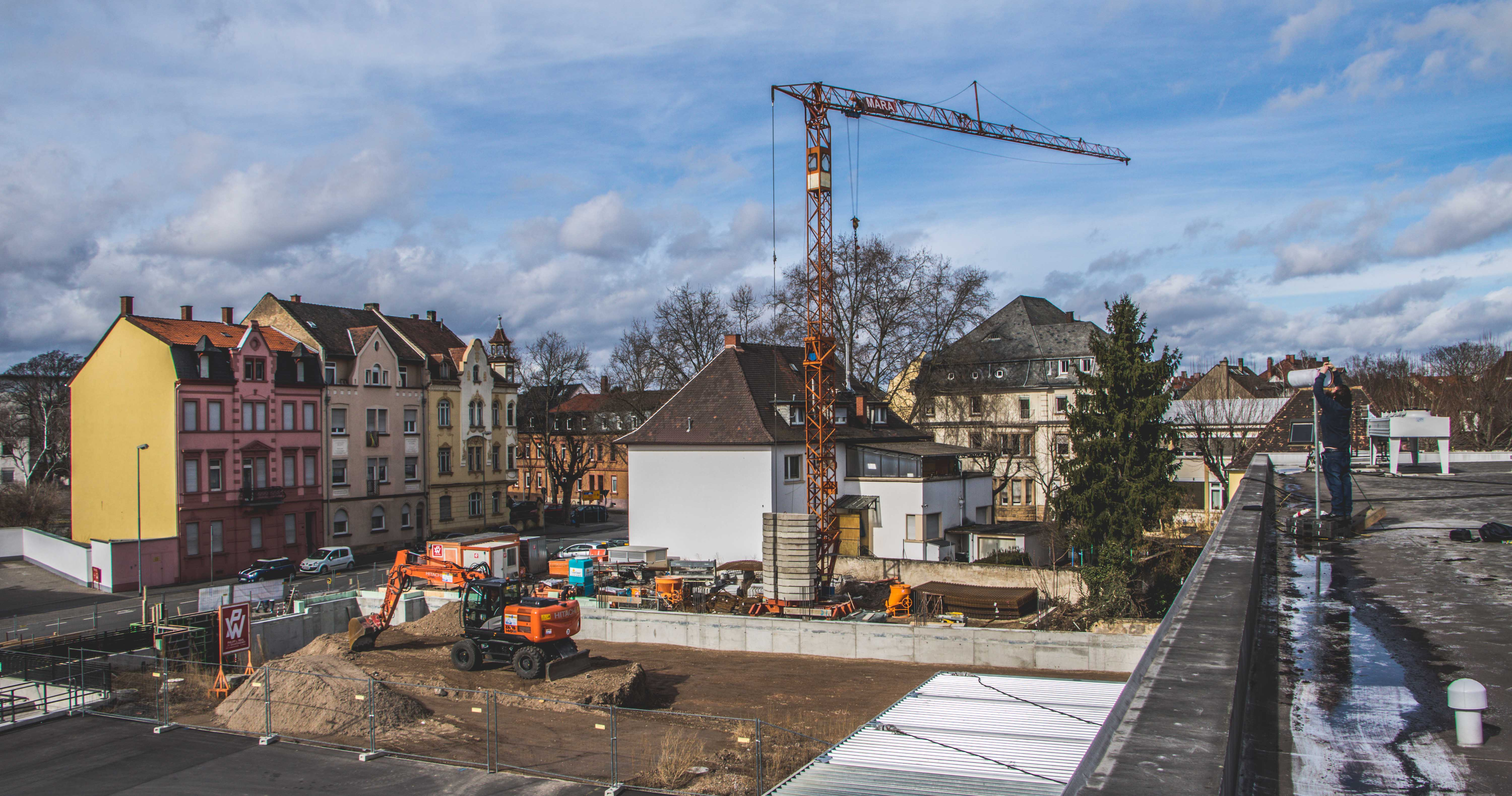 Erste Grundmauern sind bereits gegossen. Zudem wird gerade das Kamerasystem gewartet, welches die Bauarbeiten über den gesamten Zeitraum bildhaft dokumentieren wird.